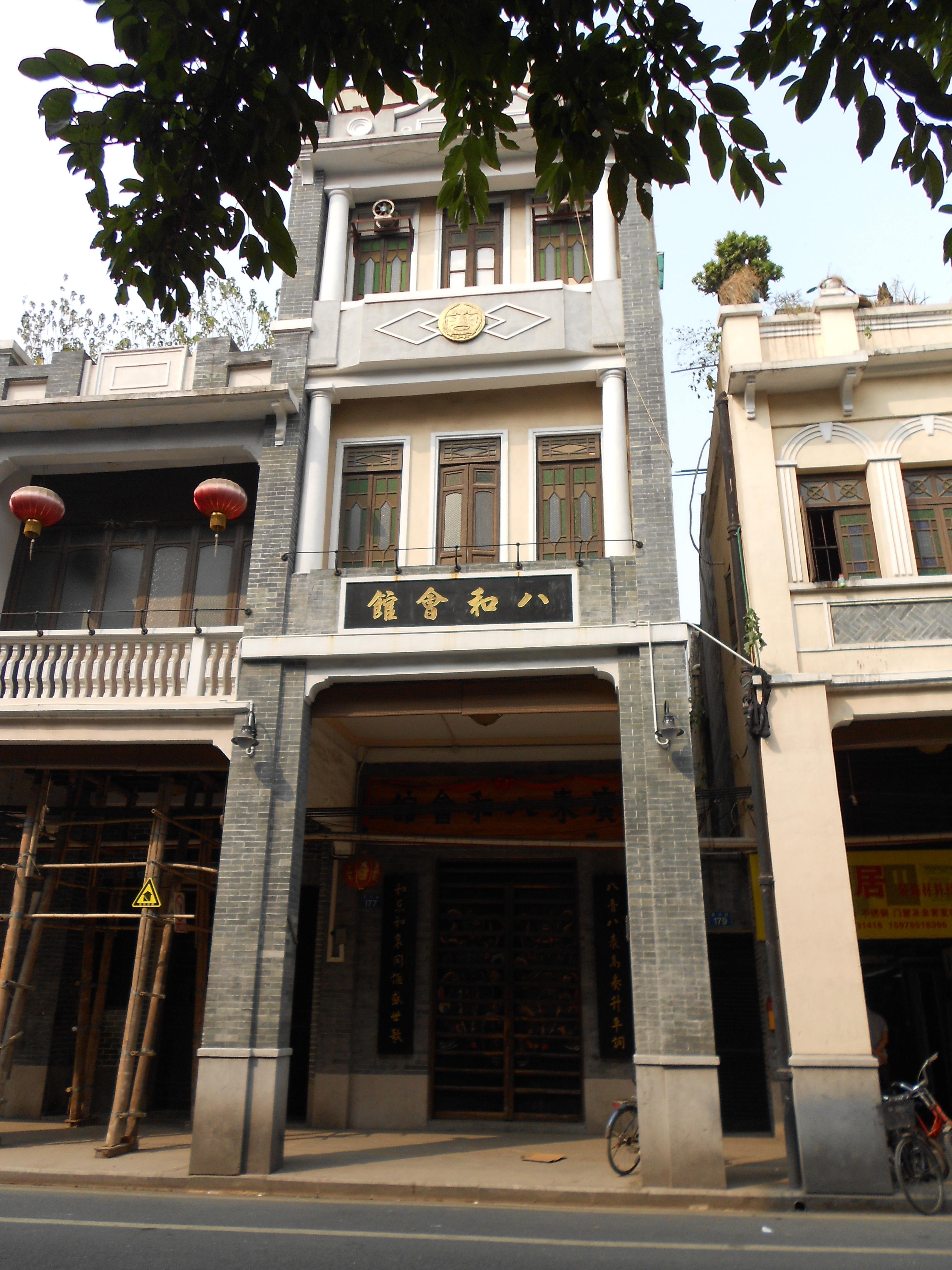 位於廣州市西關恩寧路的廣東八和會館。